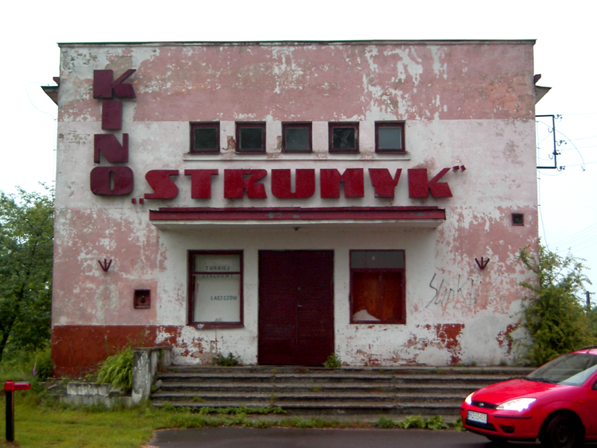 Łaszczów, Poland • Dawne Kino Strumyk / Old Cinema